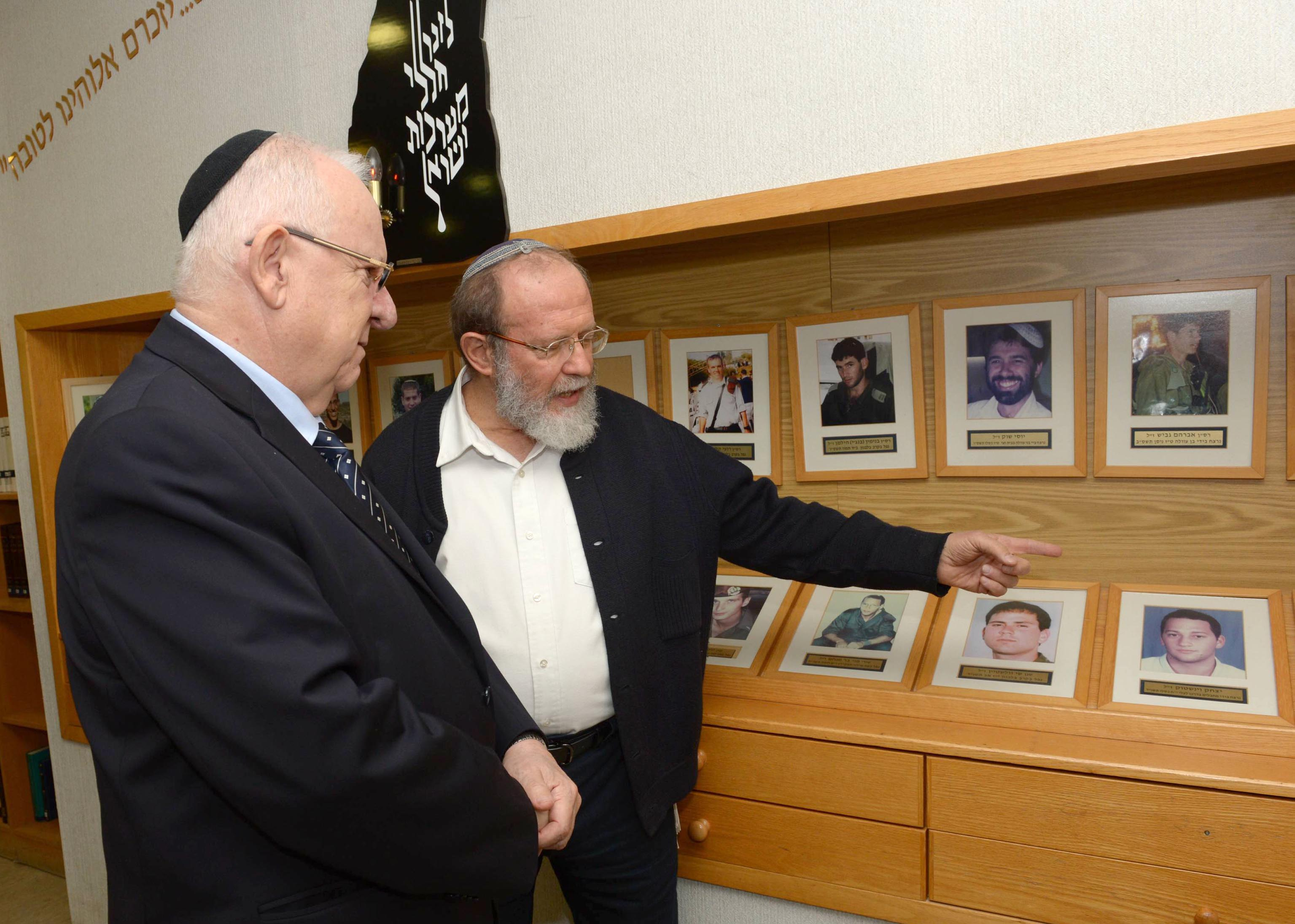 ראובן ריבלין נשיא מדינת ישראל בביקור במכינה הקדם צבאית בני דוד בעלי, בביקור נפגש עם ראשי המכינה ועם כ-400 תלמידי הישיבה לשיחה פתוחה